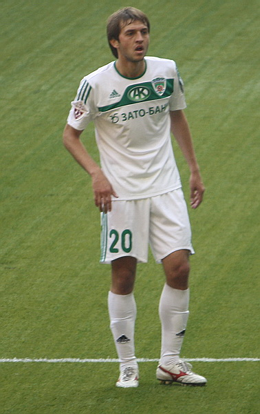 Andrey Kobenko